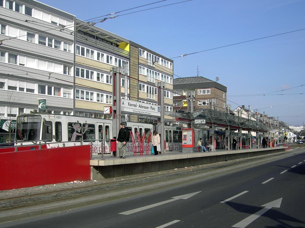 Stadtbahnhaltestelle Konrad-Adenauer-Platz der Siegburger Bahn in Beuel-Mitte, Bonn-Beuel